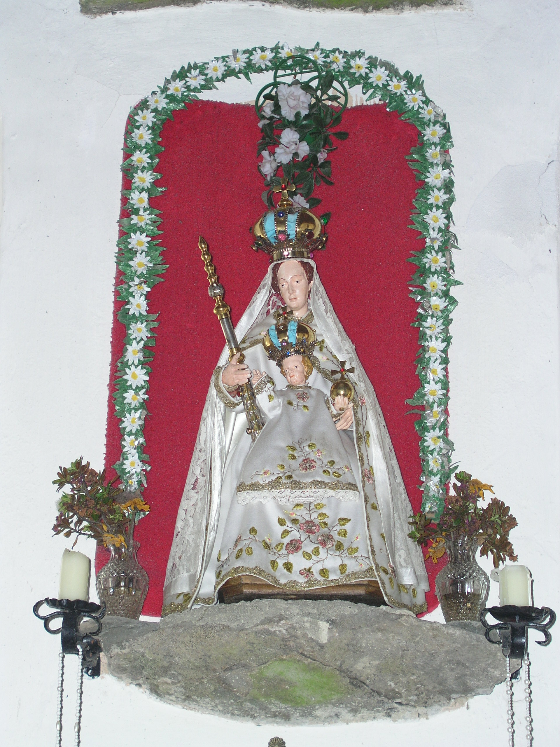 Maria mit Kind "Hochalm-Mutter", Wallfahrtskirche Maria Schnee auf der Hochalm; eigene Aufnahme des Autors